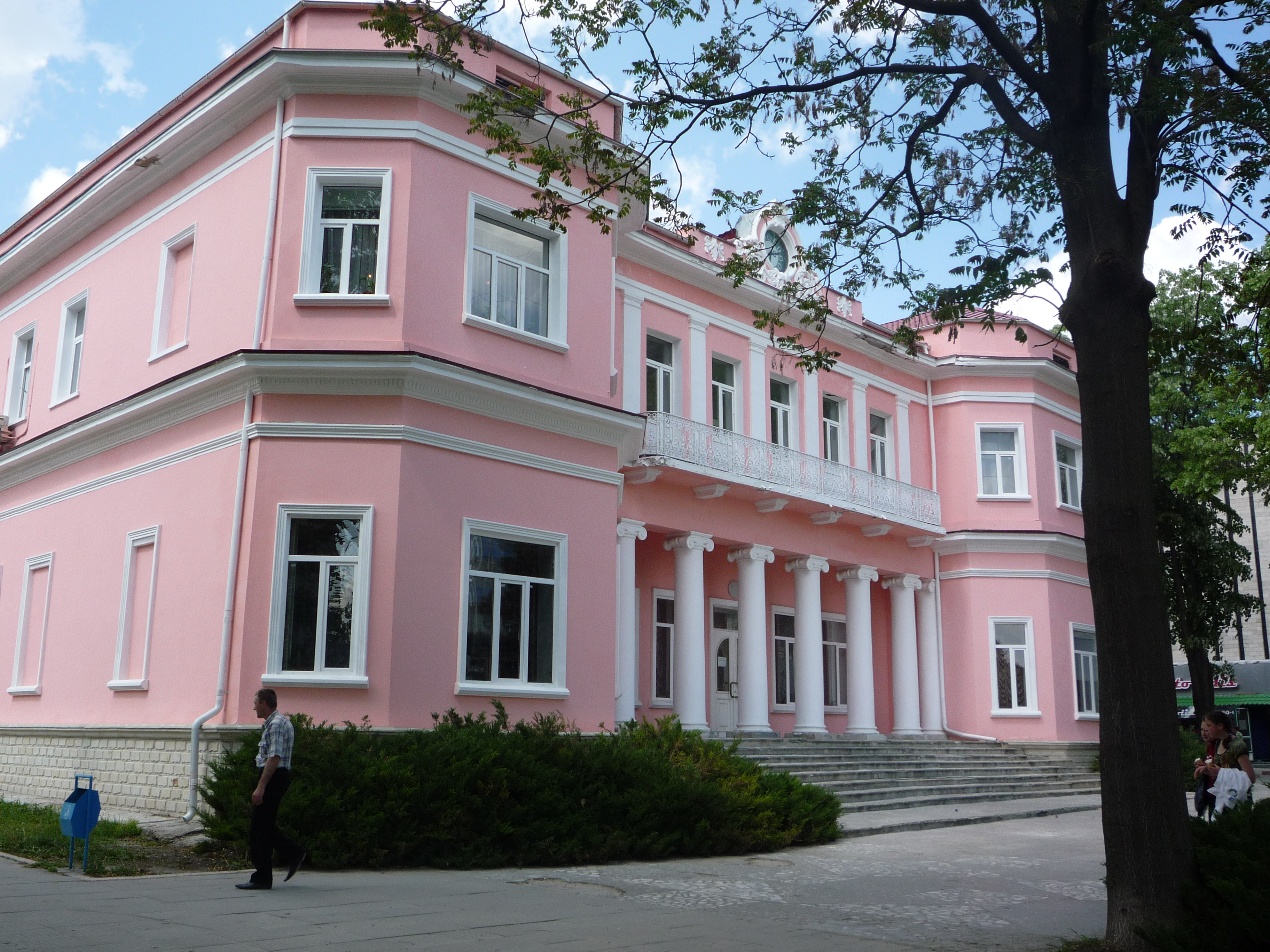 Cladirea Ofciului Starii Civile din Balti